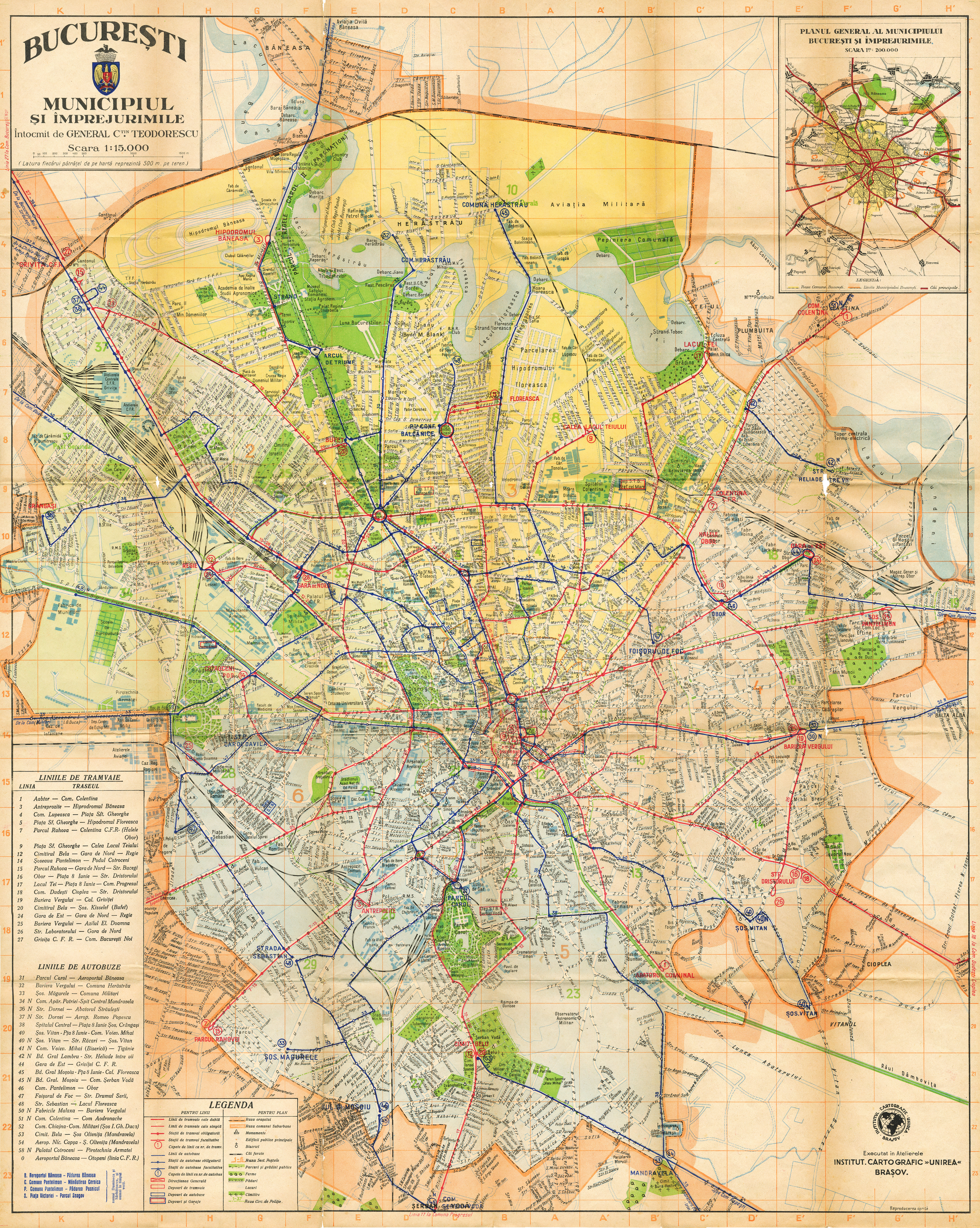 Harta bucuresti veche. Vizualizare cu zoom